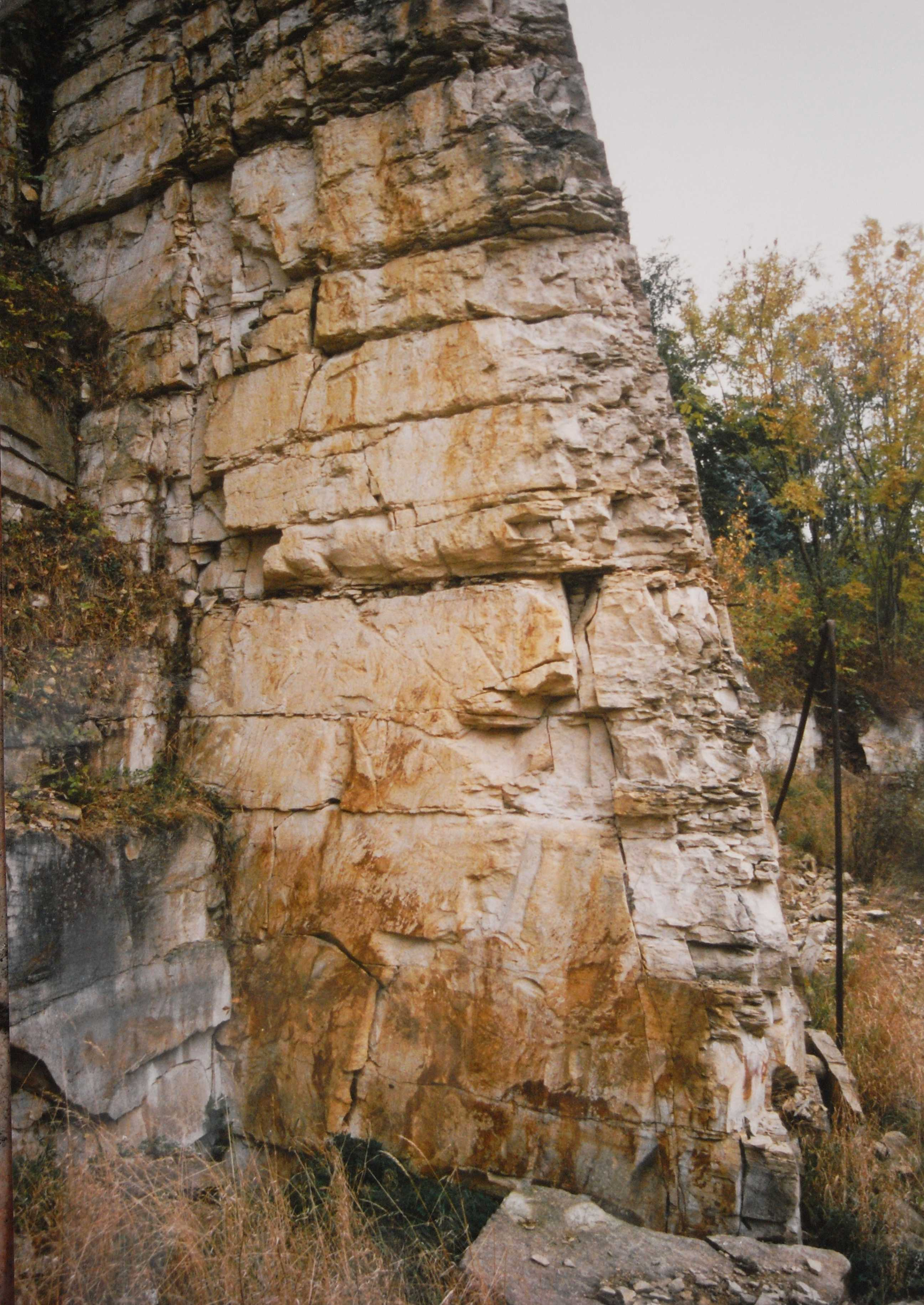 Schichtenaufbau eines Plänersteinbruchs in der Tschech. Republik